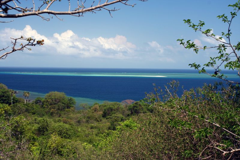 L'Îlot de Sable Blanc vu depuis la pointe Saziley.